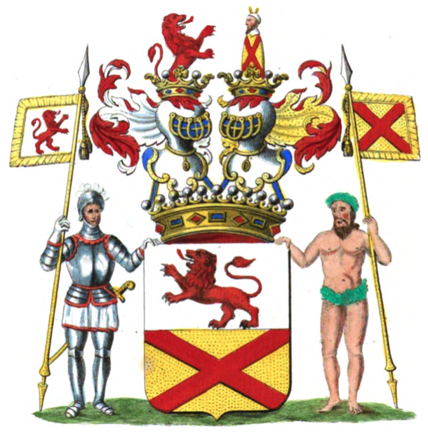 Armoiries de la famille de Bounam de Ryckholt